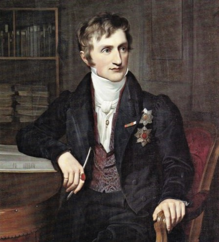 Prinz Johann als Vorsitzender des Geheimen Finanz-Kollegiums, 1832. Öl auf Leinwand, 123 x 97 cm, Galerie Neue Meister Dresden, Gal.-Nr. 2210.